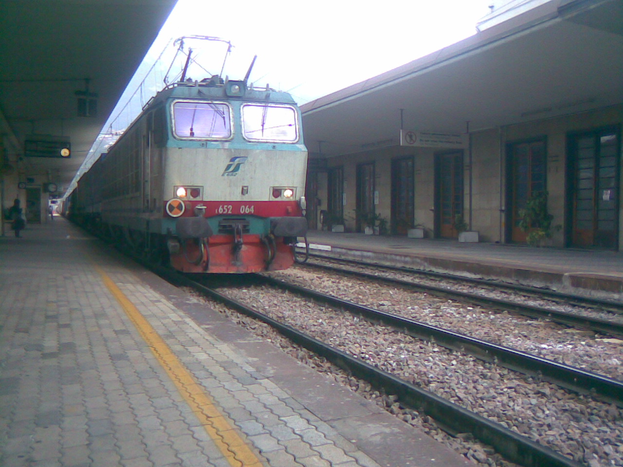 Locomotiva E.652.064 in transito presso la Stazione di Trento, in trazione ad un treno merci